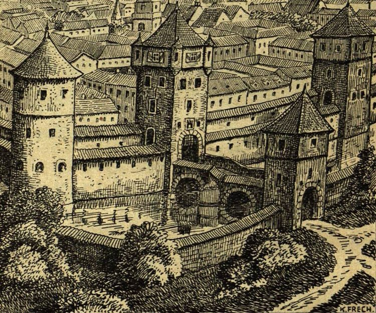 Rekonstruktionszeichnung des Malers und Graphikers Karl Frech (1883 - 1945)